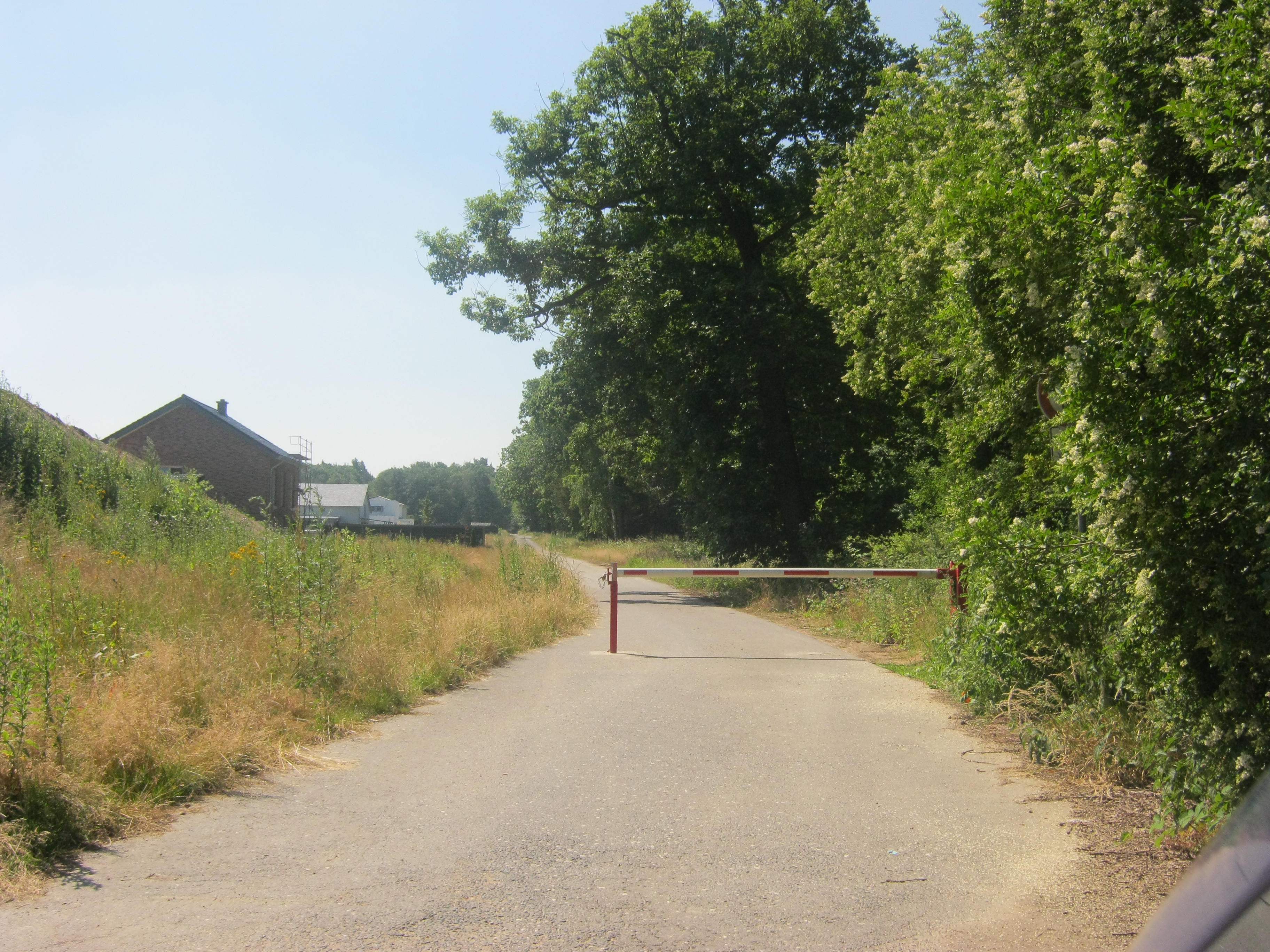 Ehemalige Zufahrt zum Munitionslager SXtockheim